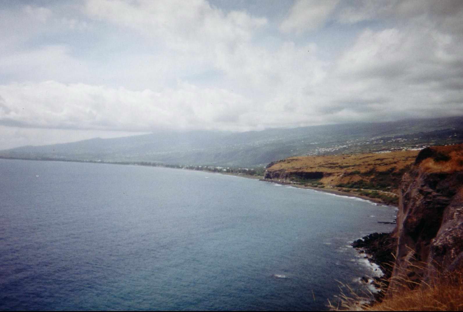 Saint-Paul, Reunion